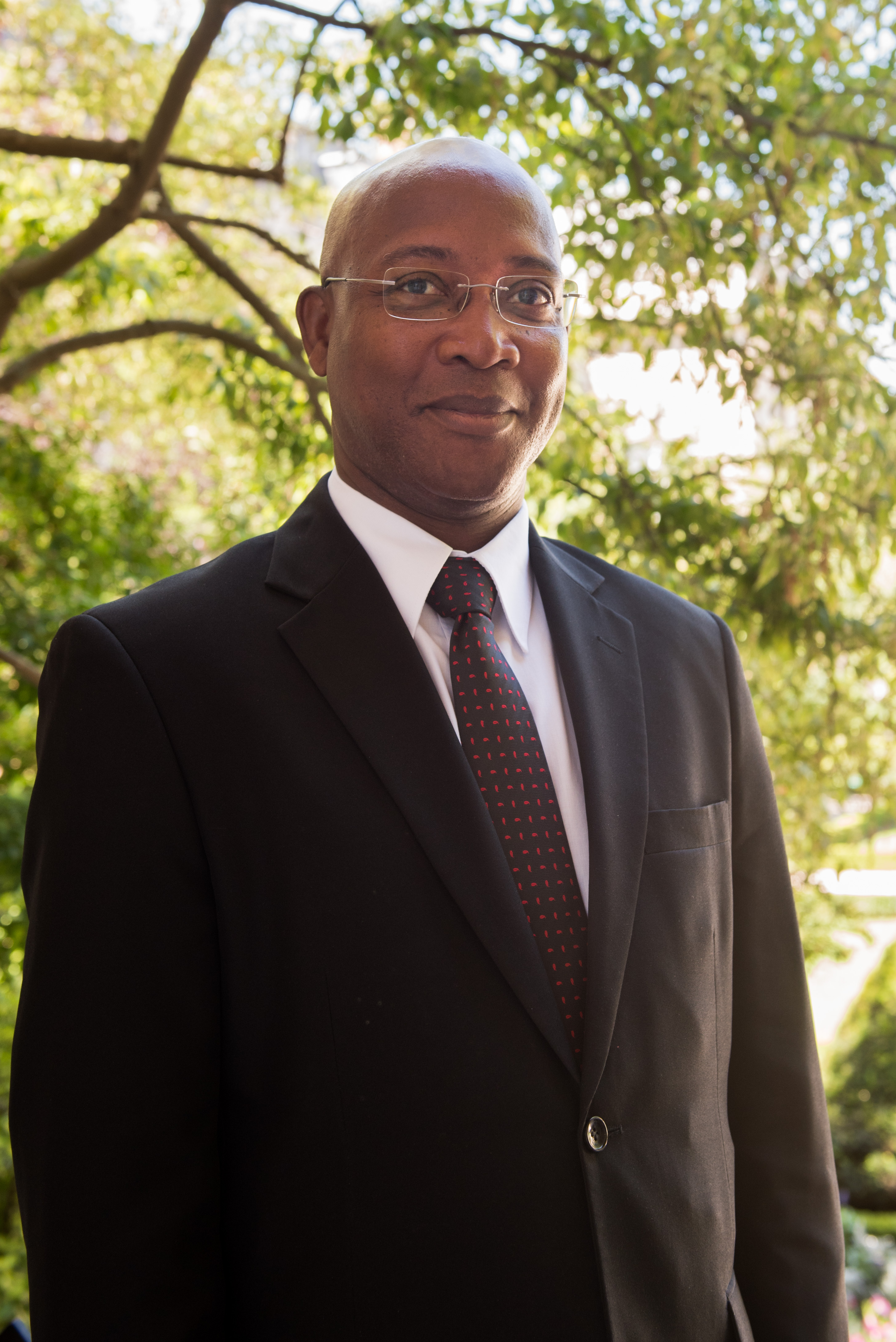 Gabriel Serville dans le jardin des Quatre colonnes du palais Bourbon en 2017.